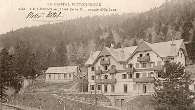 Hotel de la Compagnie de chemin de fer de Paris à Orléans, au Lioran (15).